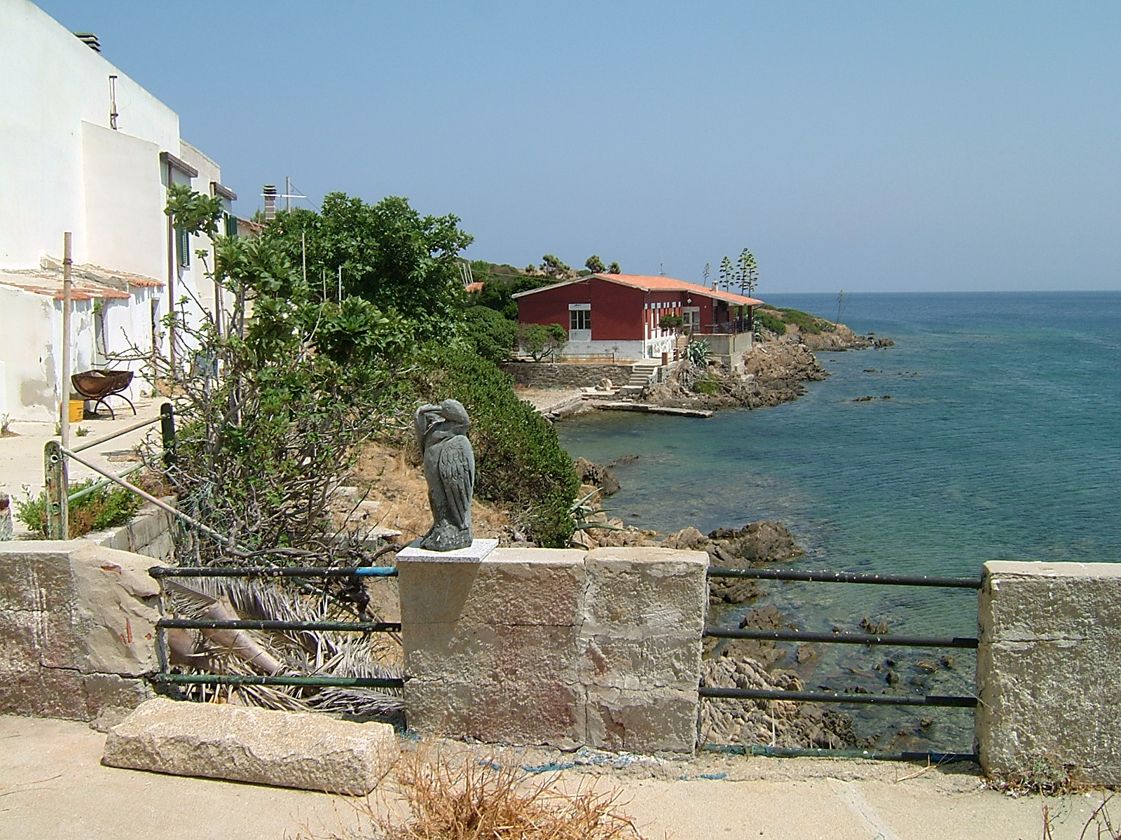 Opera di Federico Gandolfi , estate 2006.